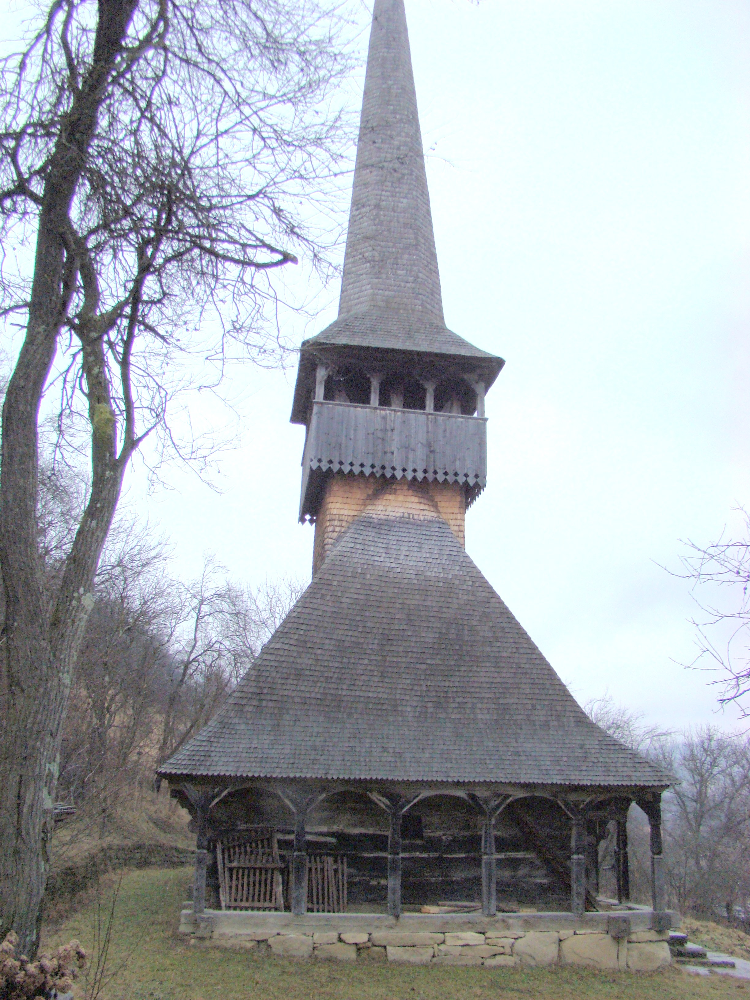 Biserica de lemn „Sf,Arhangheli” din Voivodeni, Sălaj